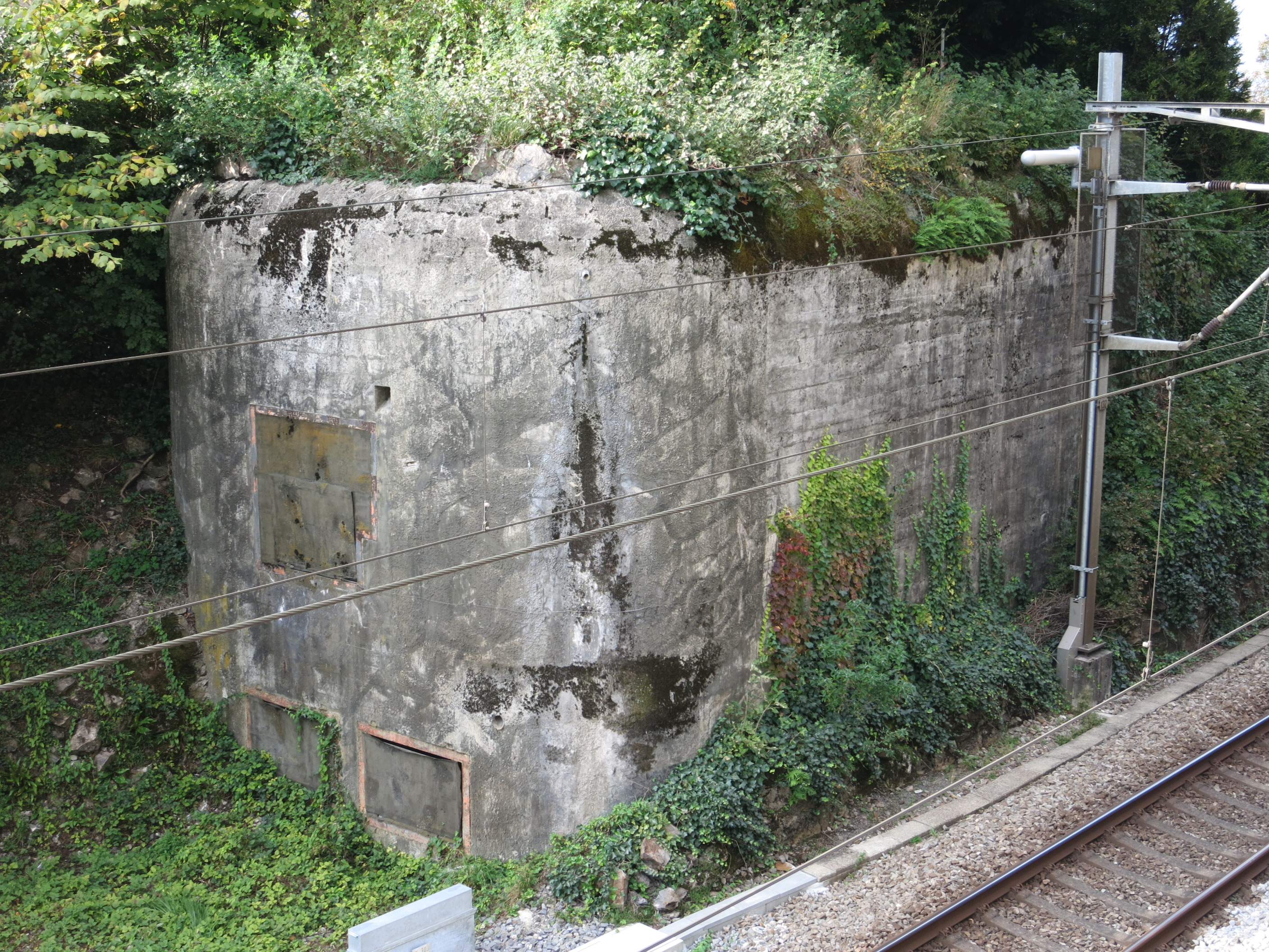 Sperrstelle Chillon VD, Schweiz